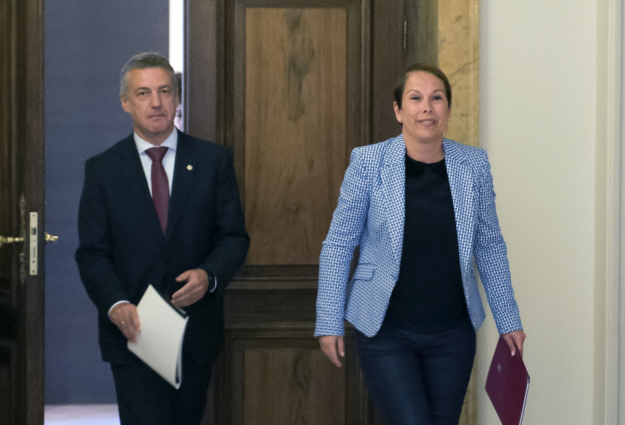 Lehendakaria Nafarroako Foru Erkidegoko lehendakari Uxue Barkosekin elkartu da